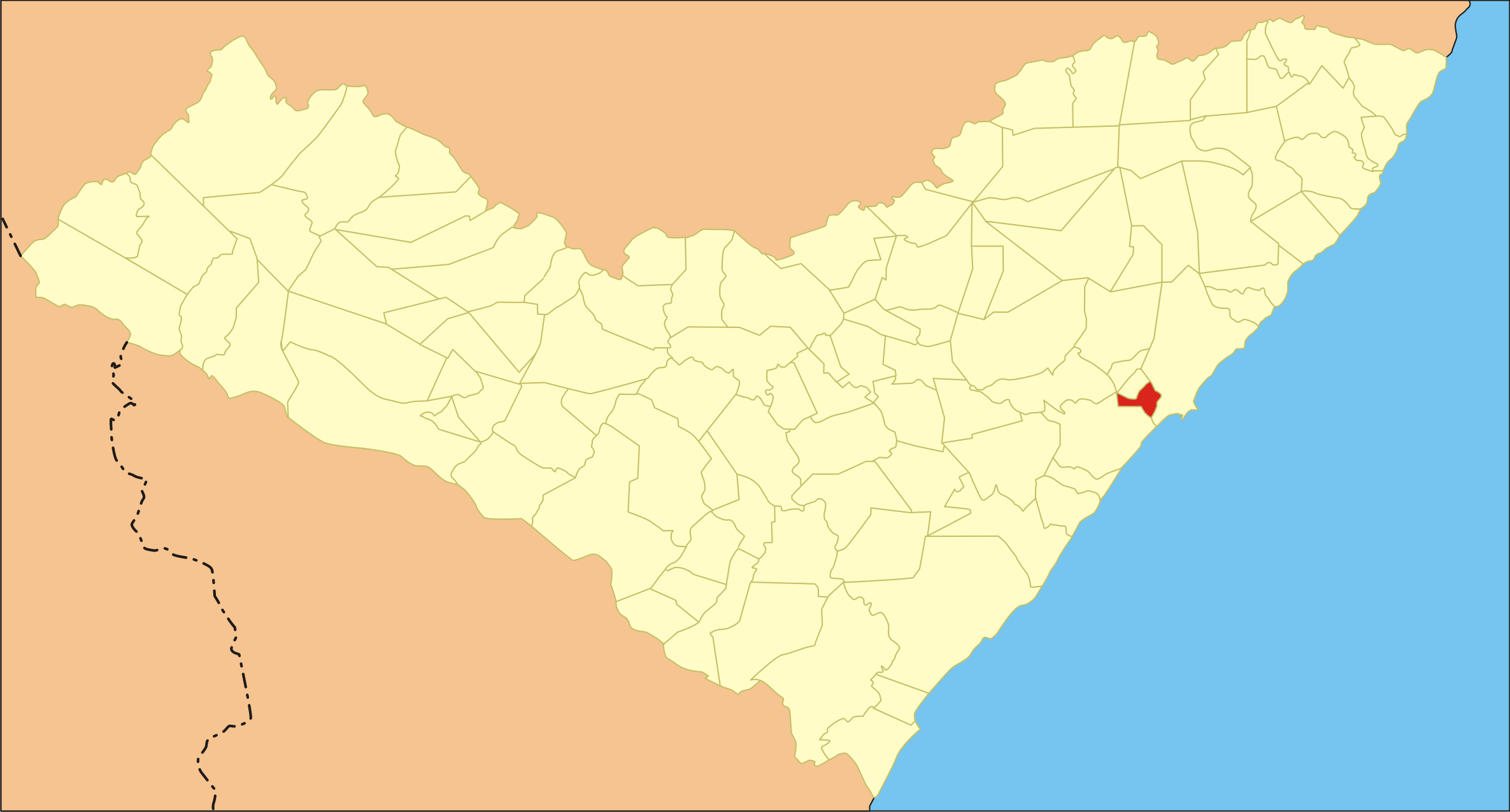 Localização da cidade em Alagoas